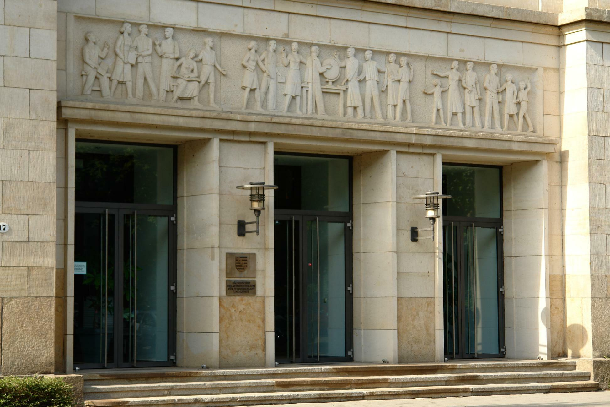 Dresden-Neustadt, Wigardstraße 17. Portal des ehem. Gebäudes der Pädagogischen Hochschule Dresden, heute Sitz des Sächsischen Staatsministeriums für Wissenschaft und Kunst.